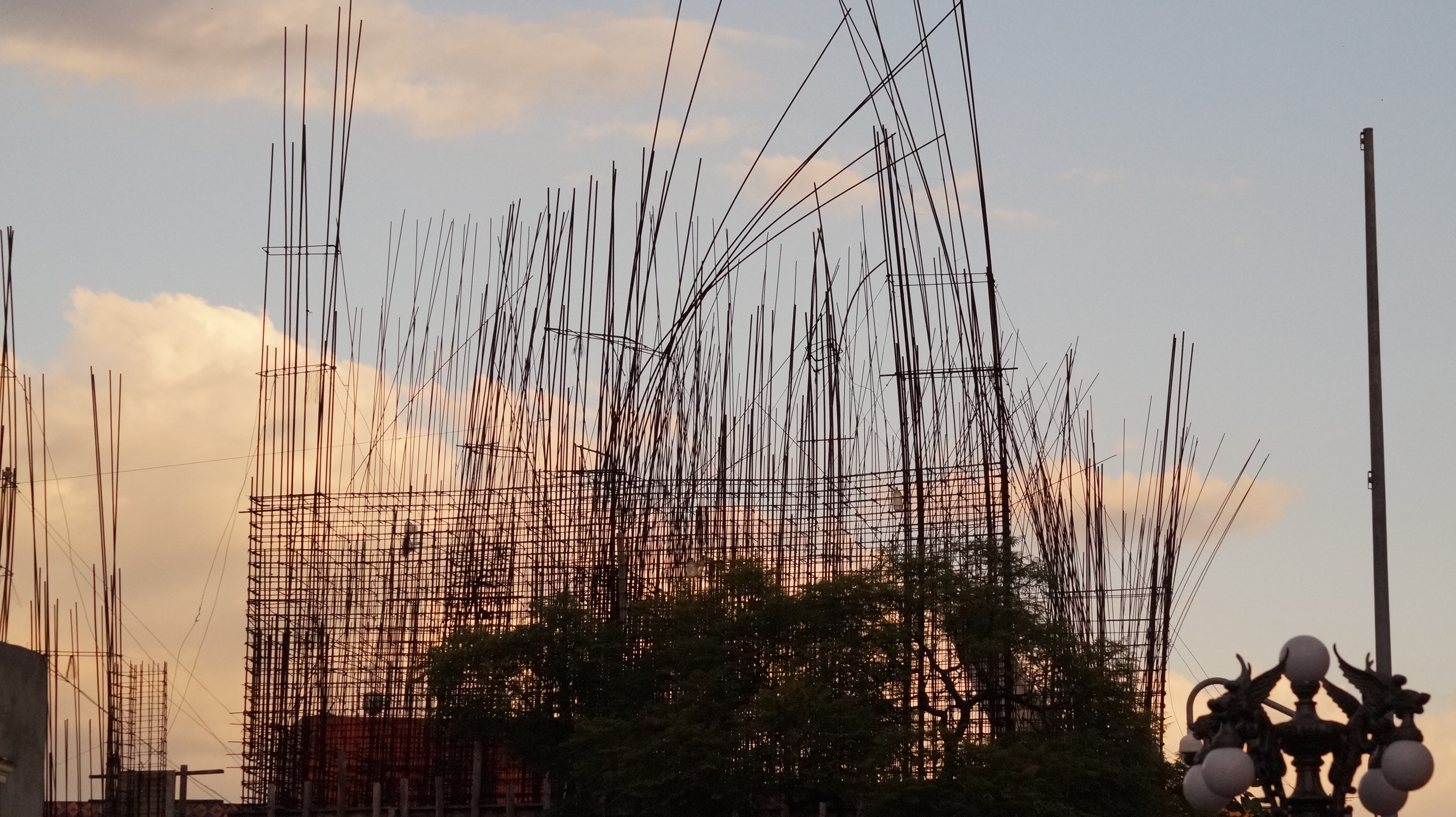 La Casa del Torno durante su destrucción en 2015, Puebla, México.